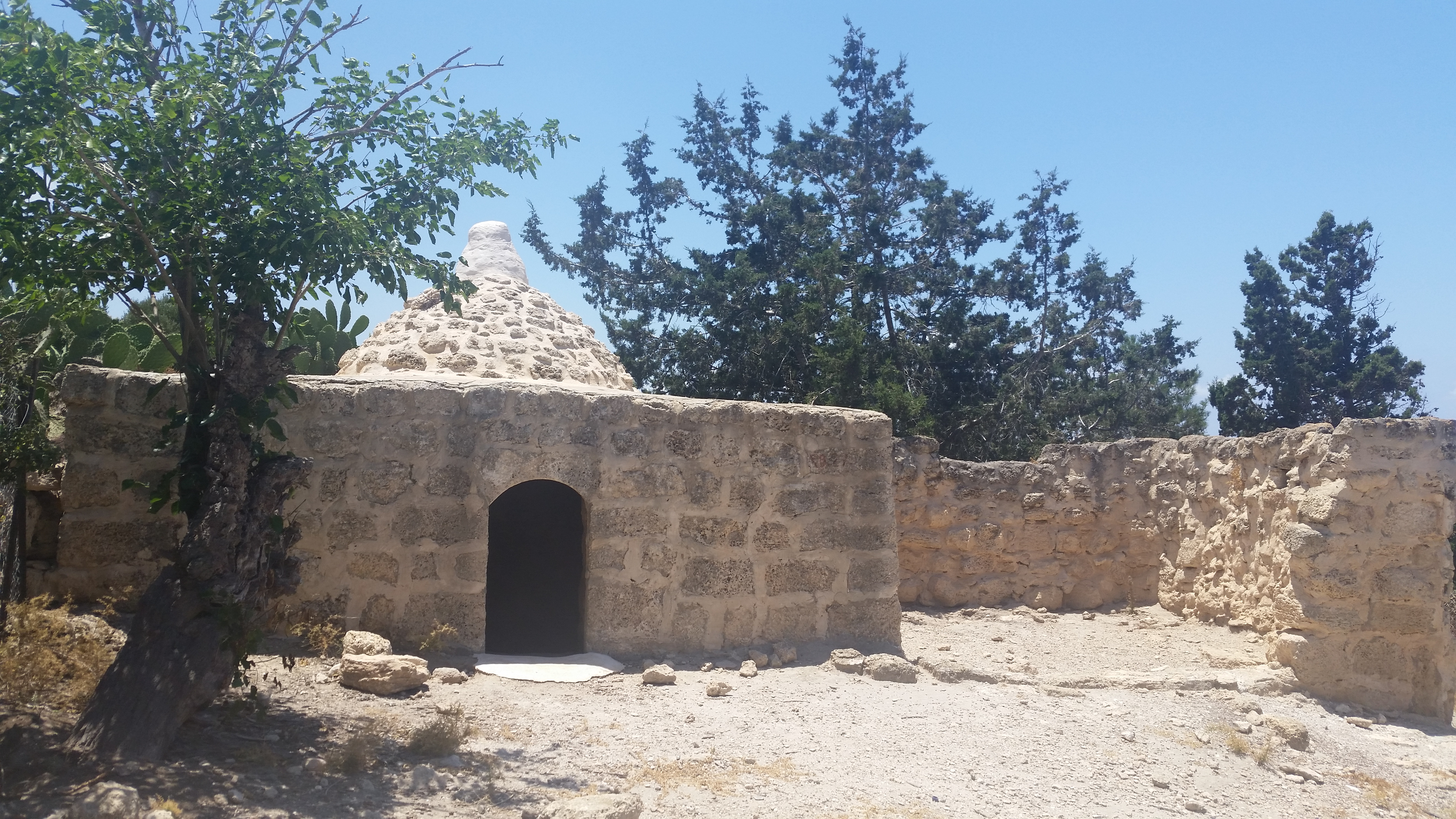 קבר שייח' בוריק שוכן על רכס הכורכר ליד עתלית ממזרח ומול נווה ים. בקרבתו הייתה התיישבות כפרית ארמנית שהחלה בתחילת המאה העשרים והסתיימה סופית בשנות השבעים.